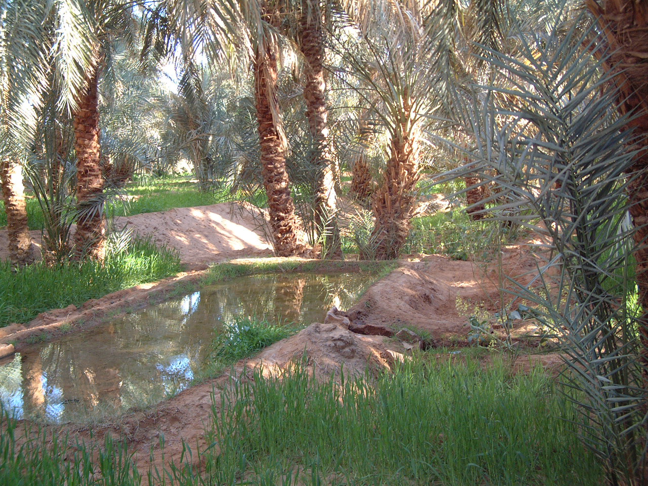 Une oasis à Timimoun dans le désert algérien